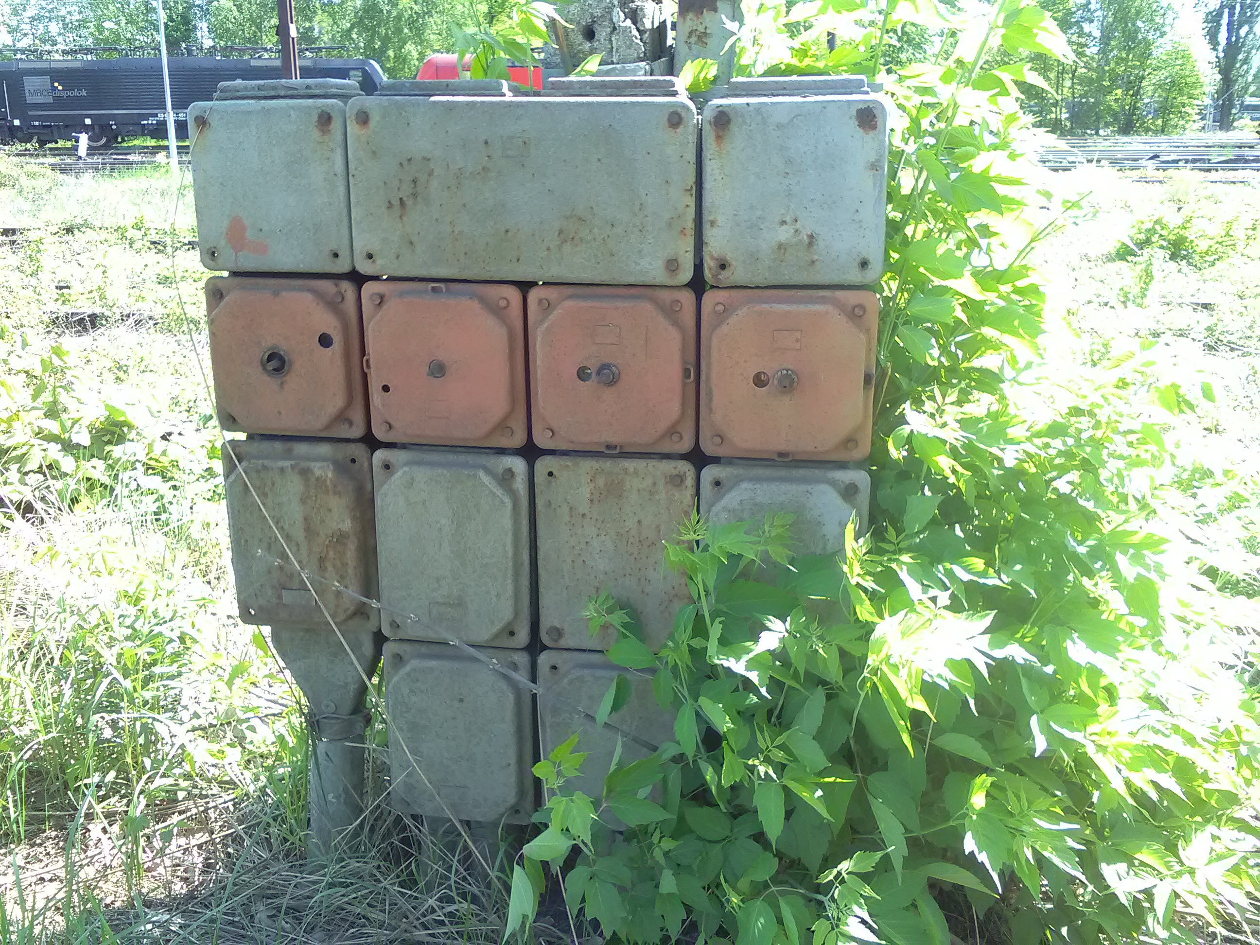 Rozdzielnica skrzynkowa żeliwna. Kobylepole Poznań Franowo.